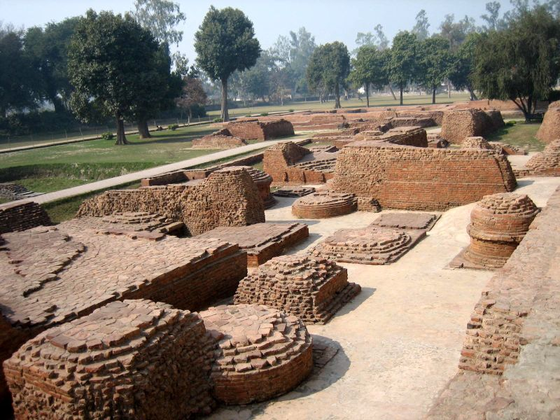 Stupa ruins in Kushinagar